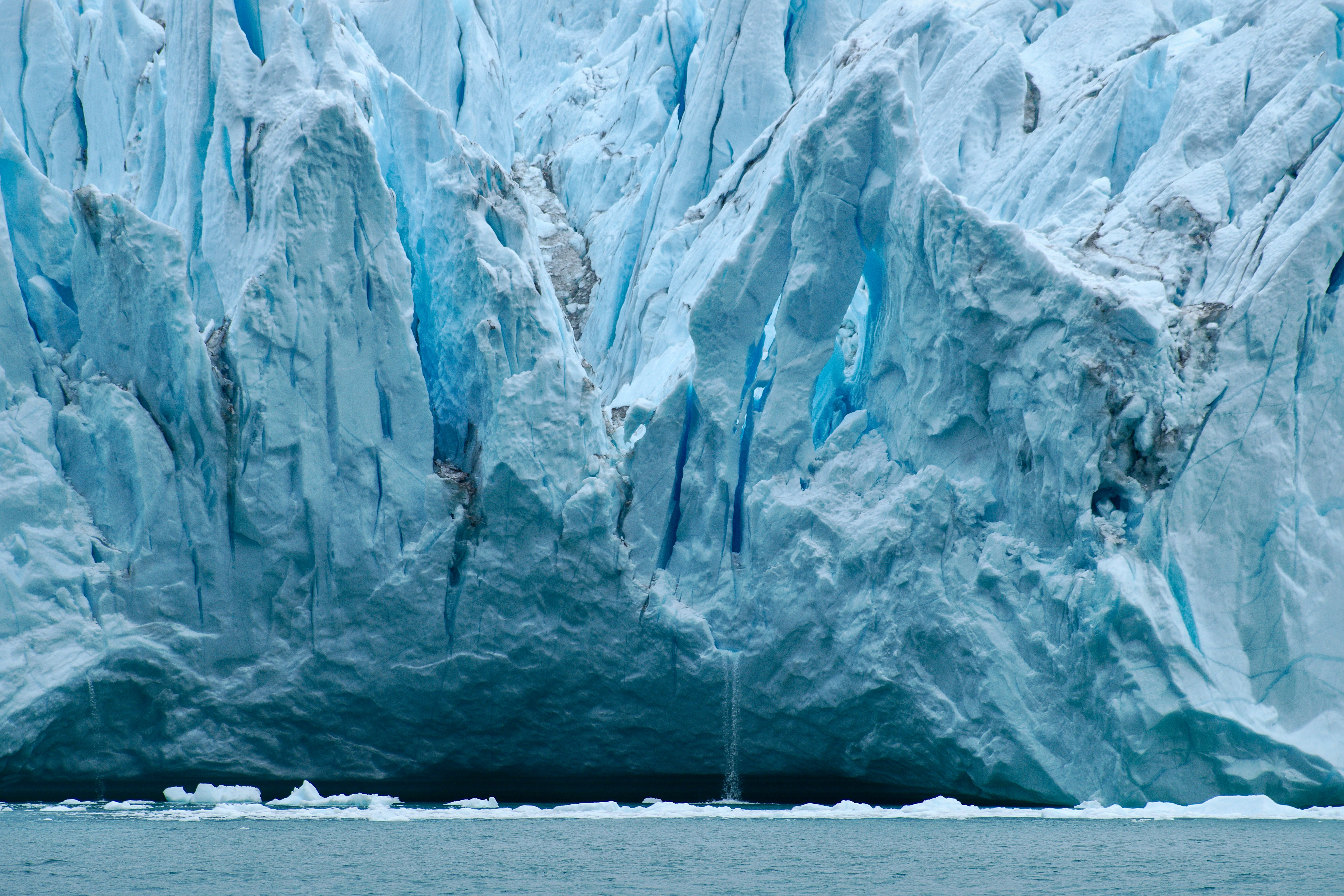 Entropy